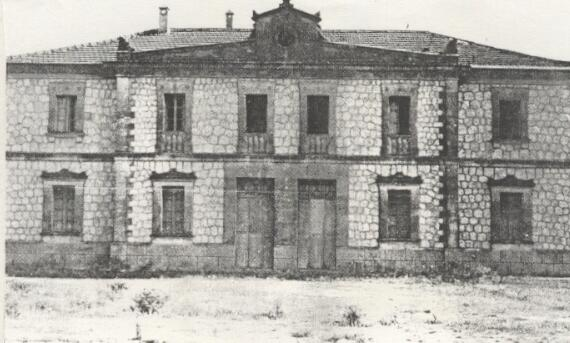 Antigua estación de Llucmayor de la línea Palma-Santañí, cerrada en 1964